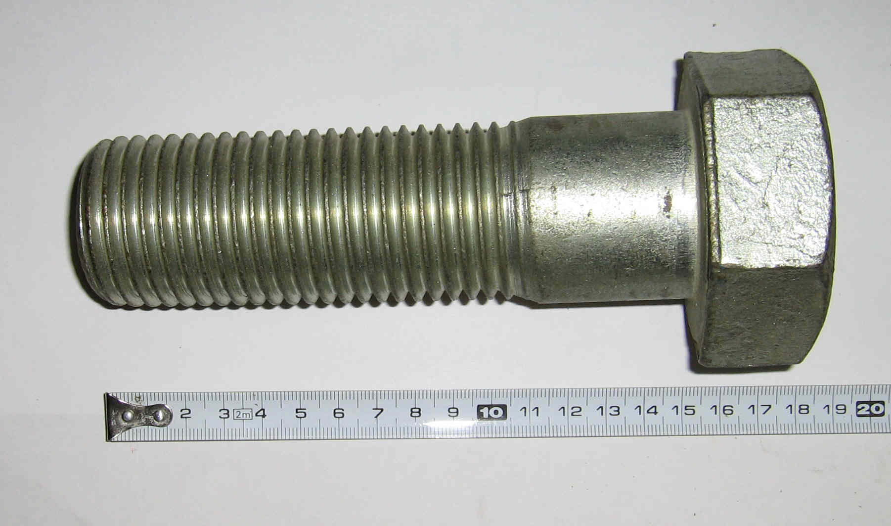 Schraube - Qualität 4.6, verzinkt